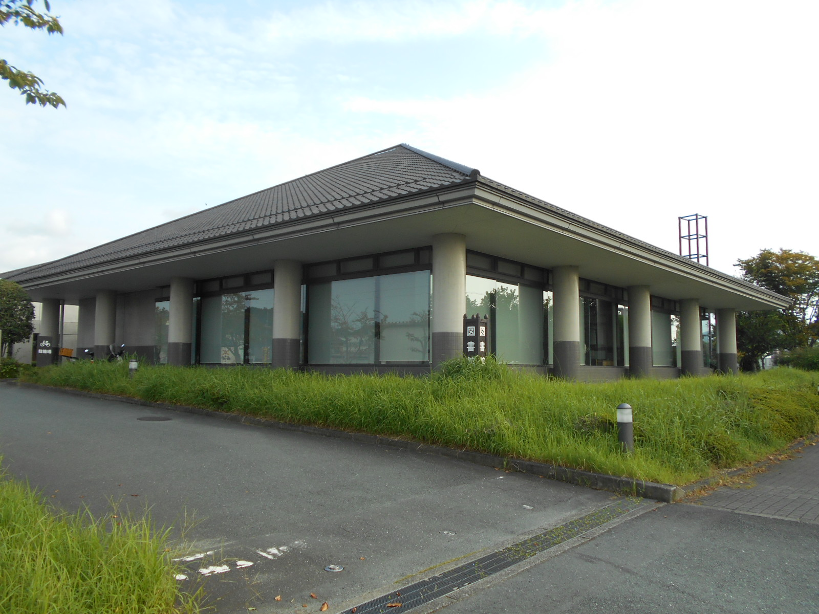 静岡県周智郡森町の森町立図書館。